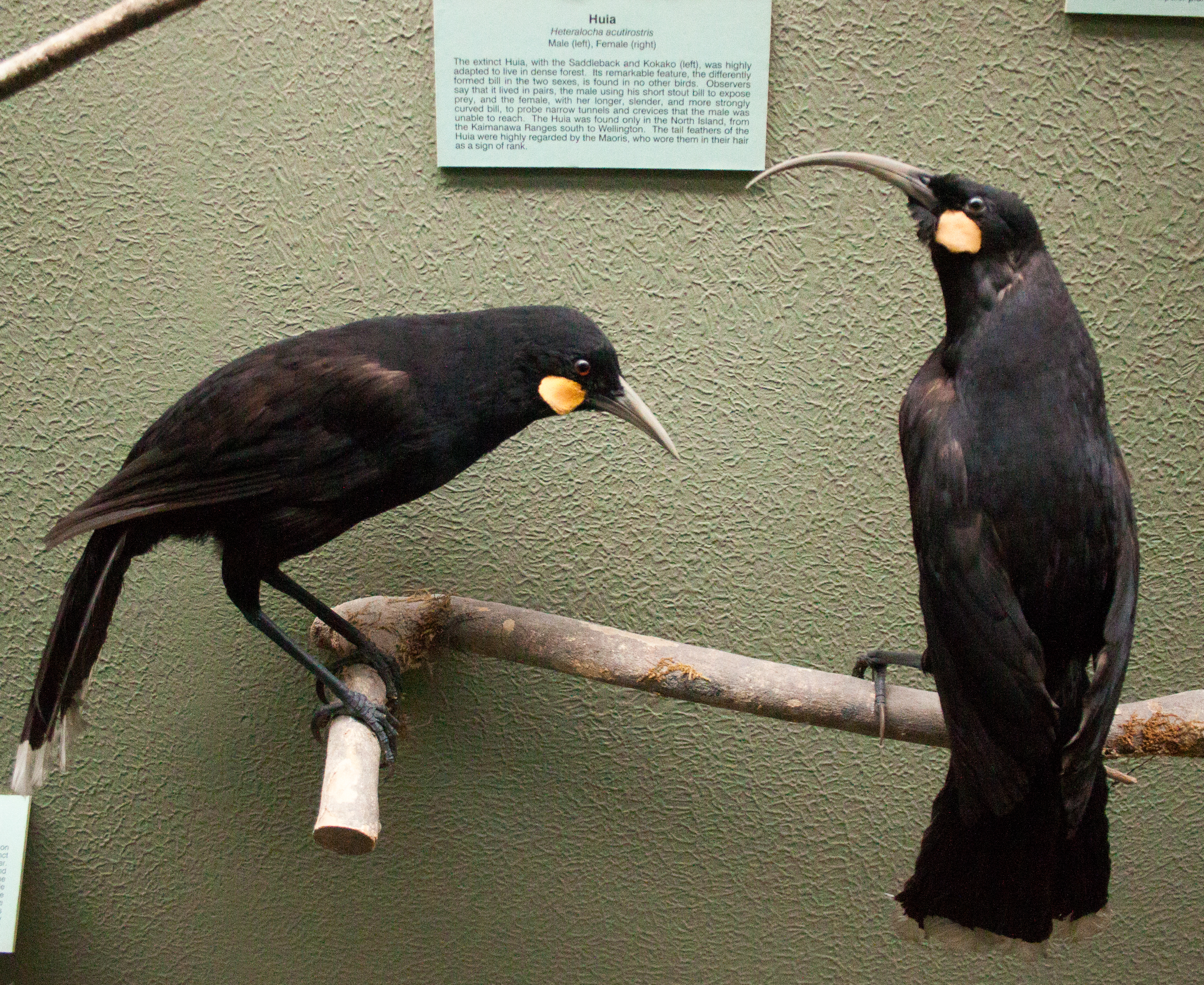 Huia